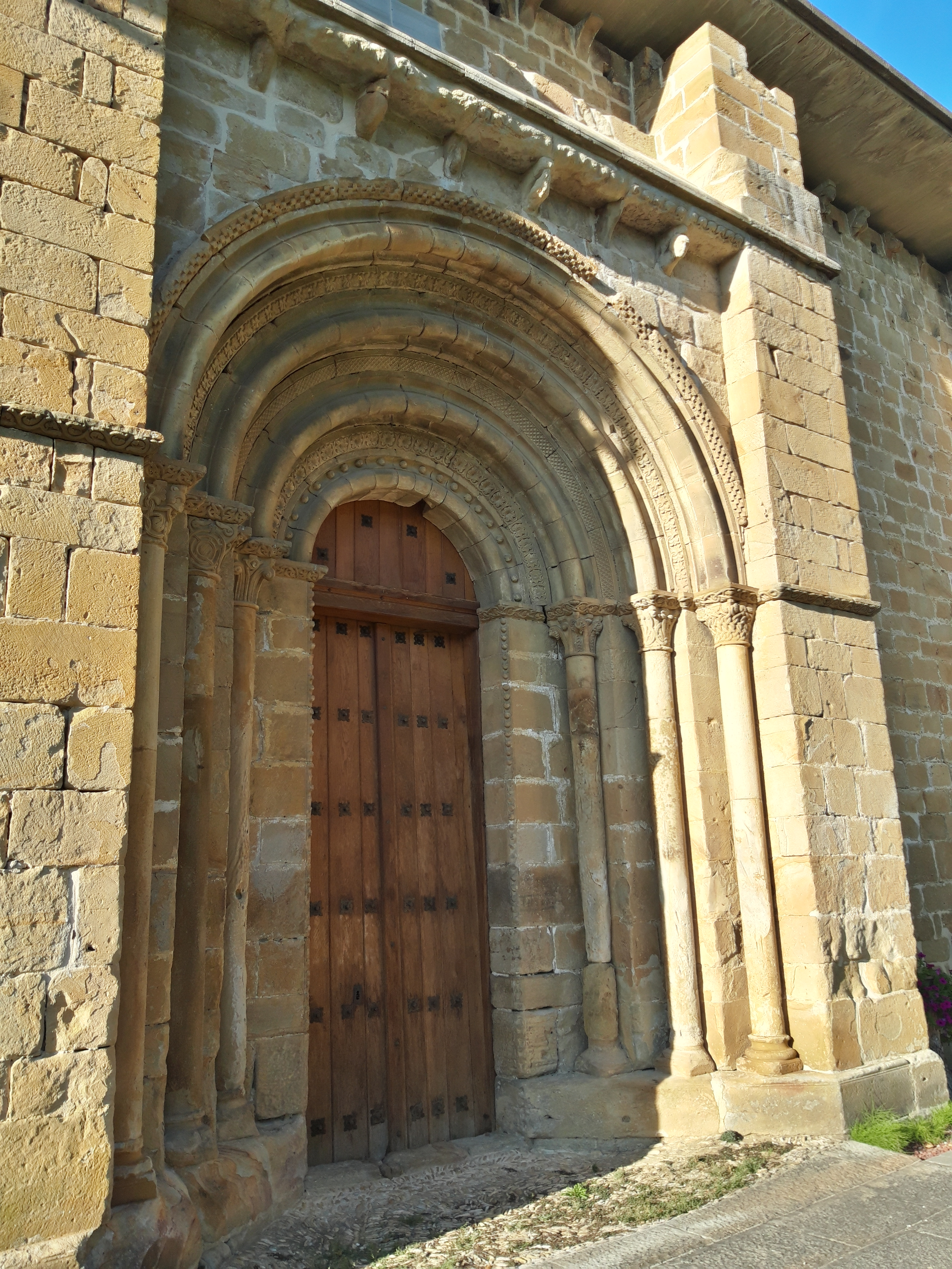 Zamartzeko Andra Maria elizako atea monumentala.